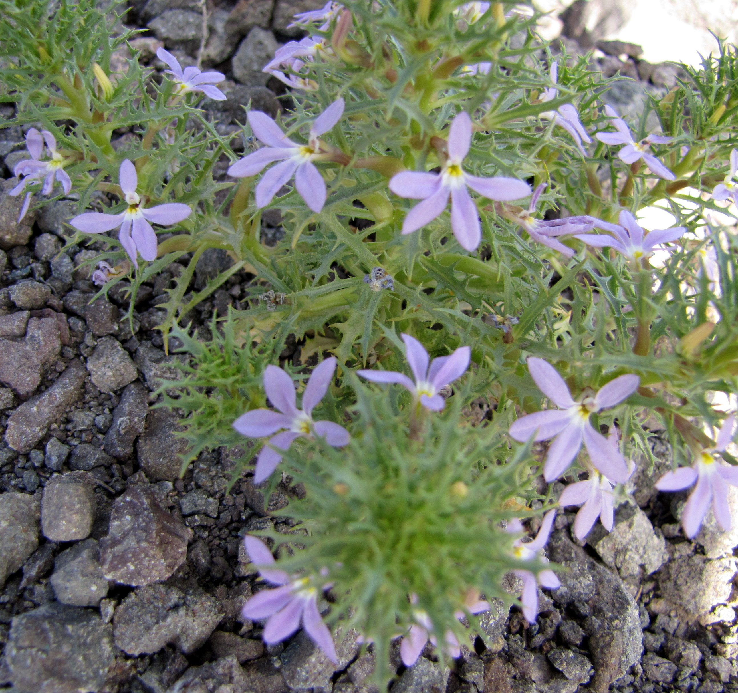 Es una herbácea.